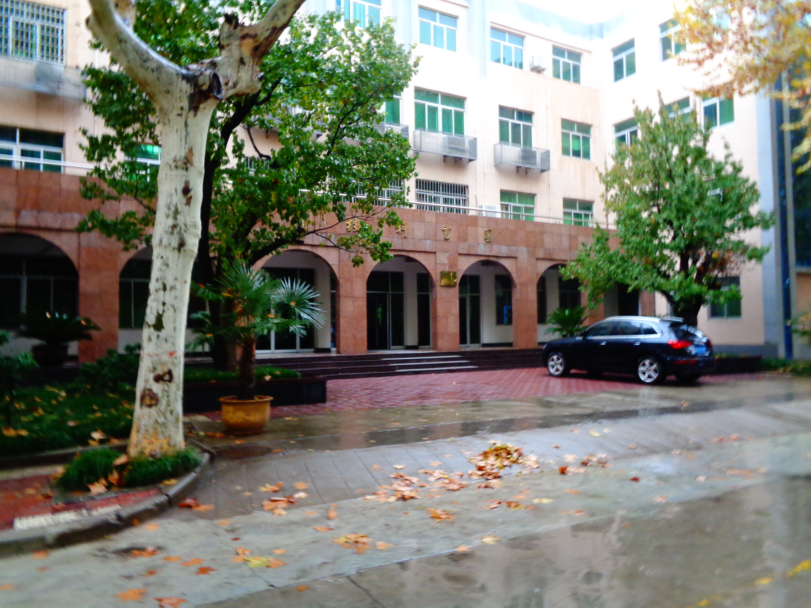 陕师大附中崇是楼和科技楼